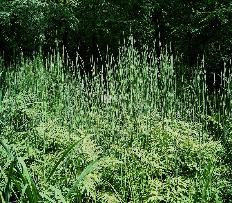 Equisetum giganteum